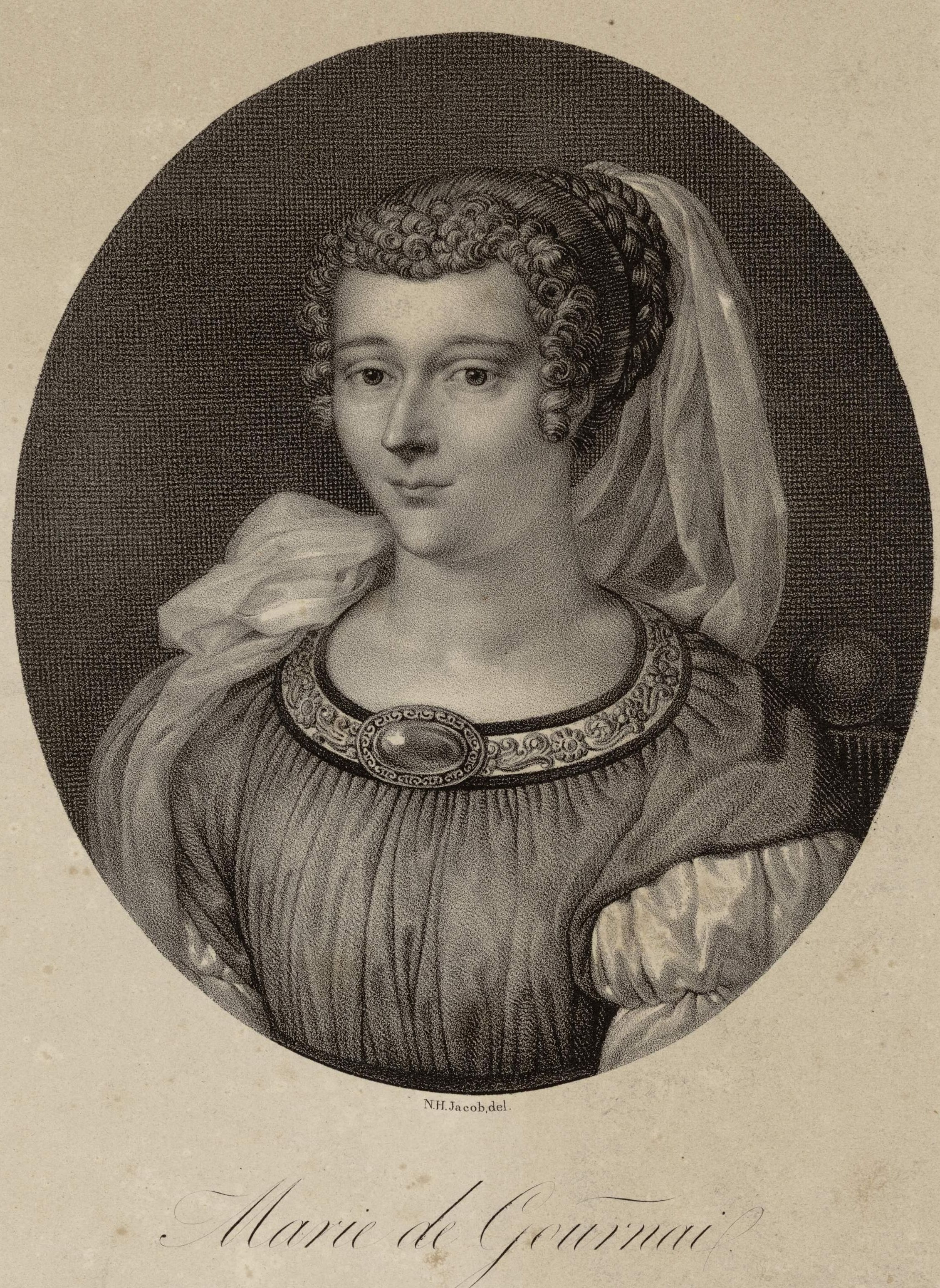 Lithographie réalisée au 19e siècle. Portrait en buste, en médaillon, tourné vers la gauche. 41,6 x 28,8 cm. image recadrée